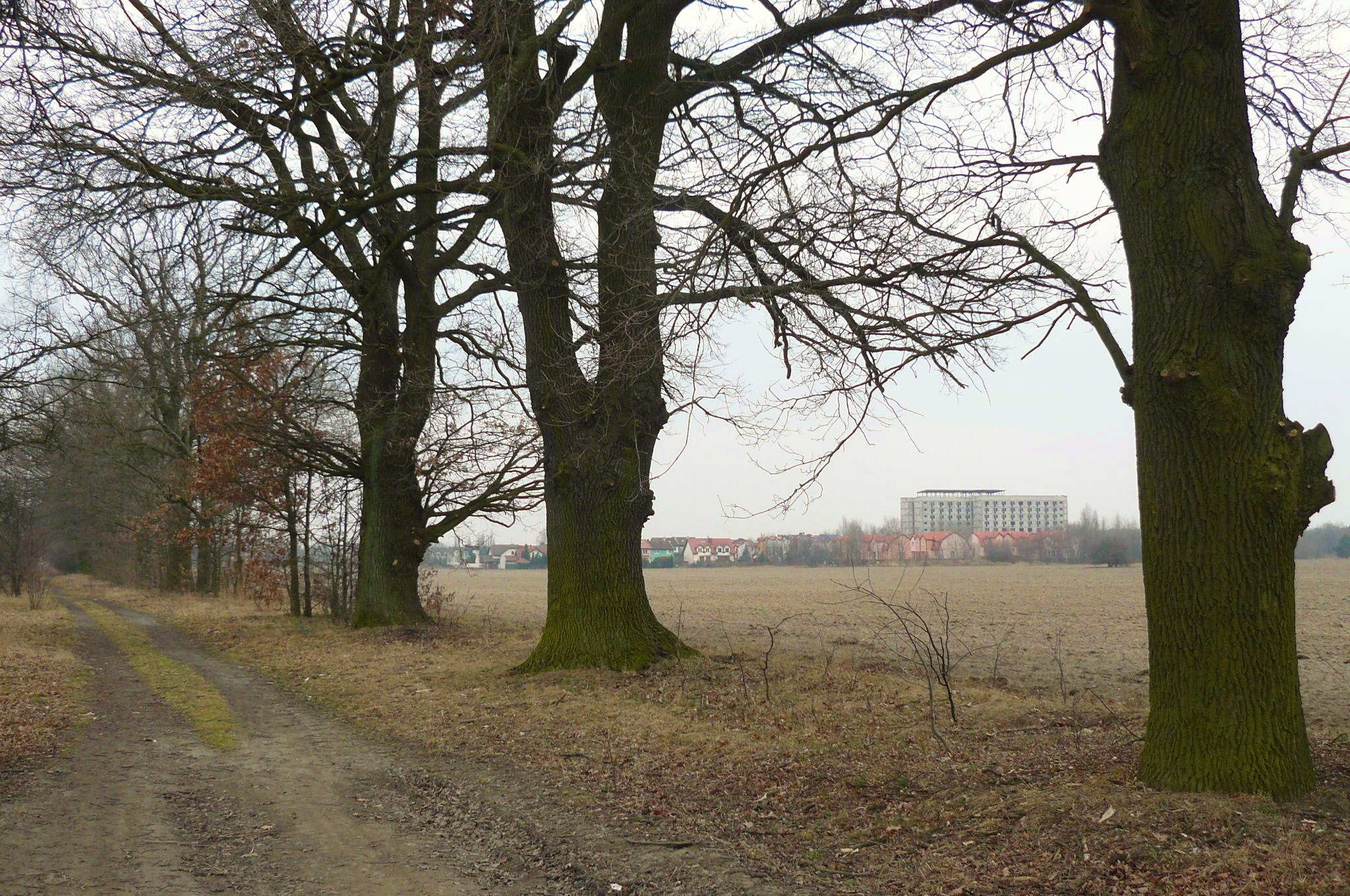 Zabytkowa aleja dębowo-jesionowa w Poznaniu przy ul. Jastrowskiej (Strzeszyn).